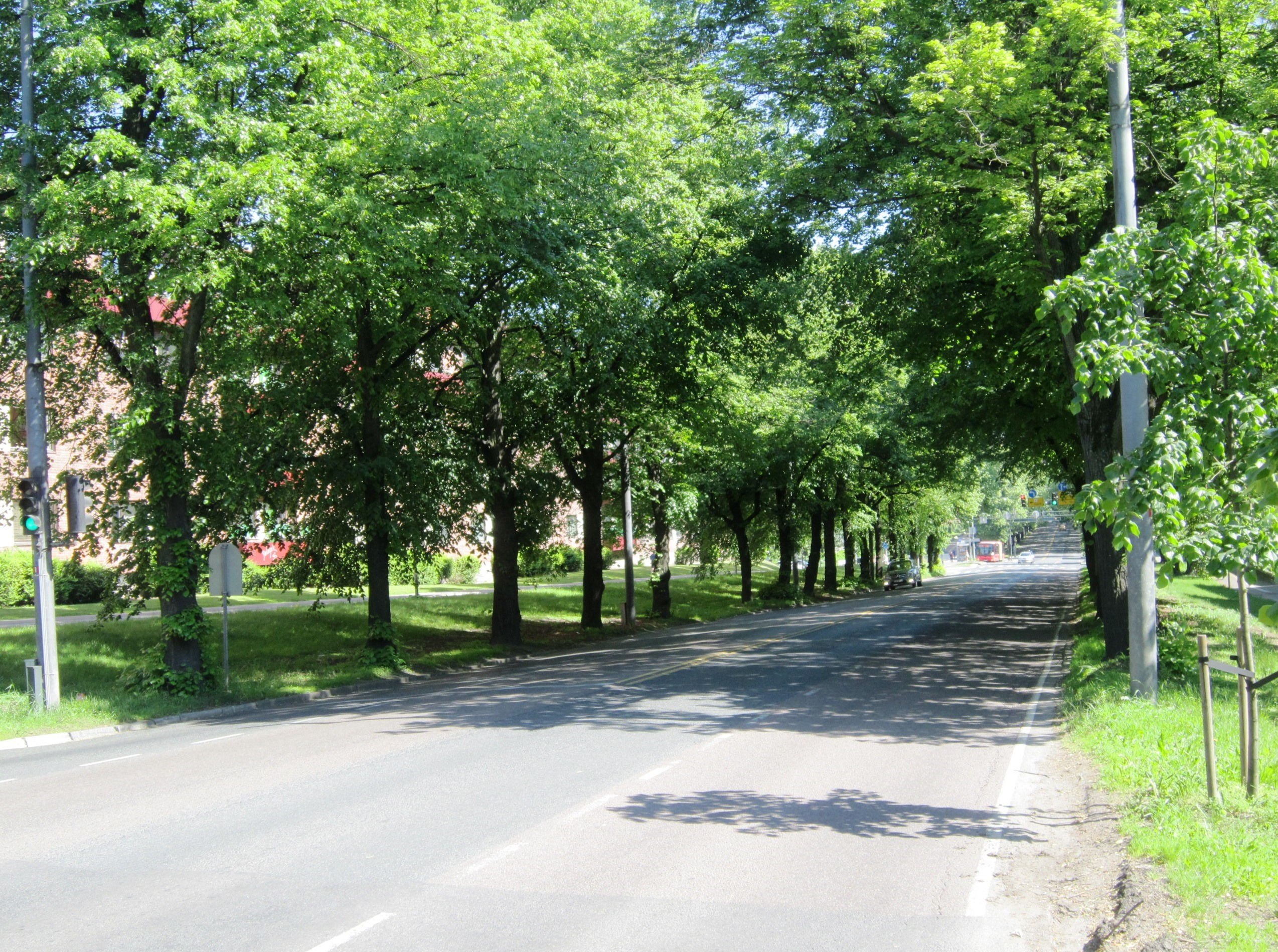 Christian Michelsens gate i Oslo